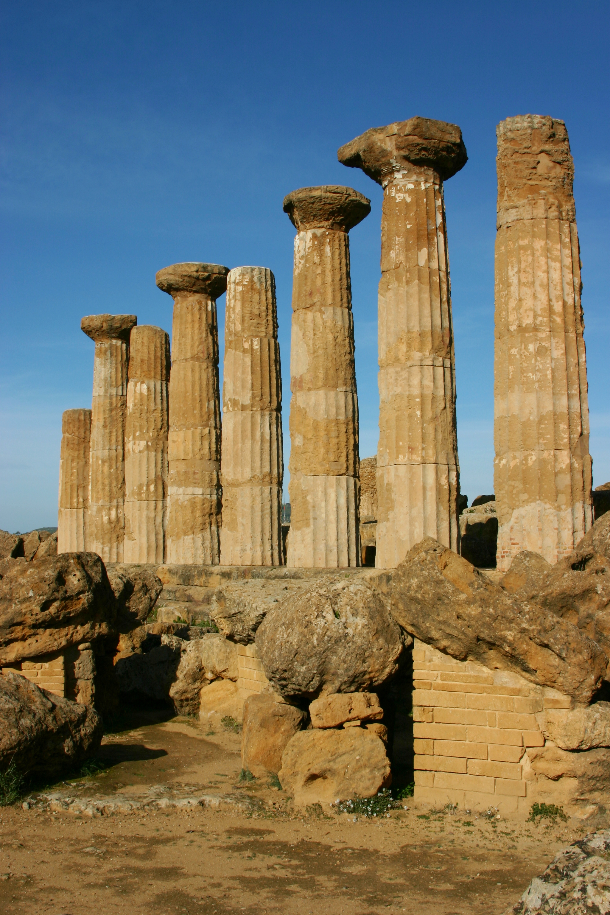 Temple of Heracles